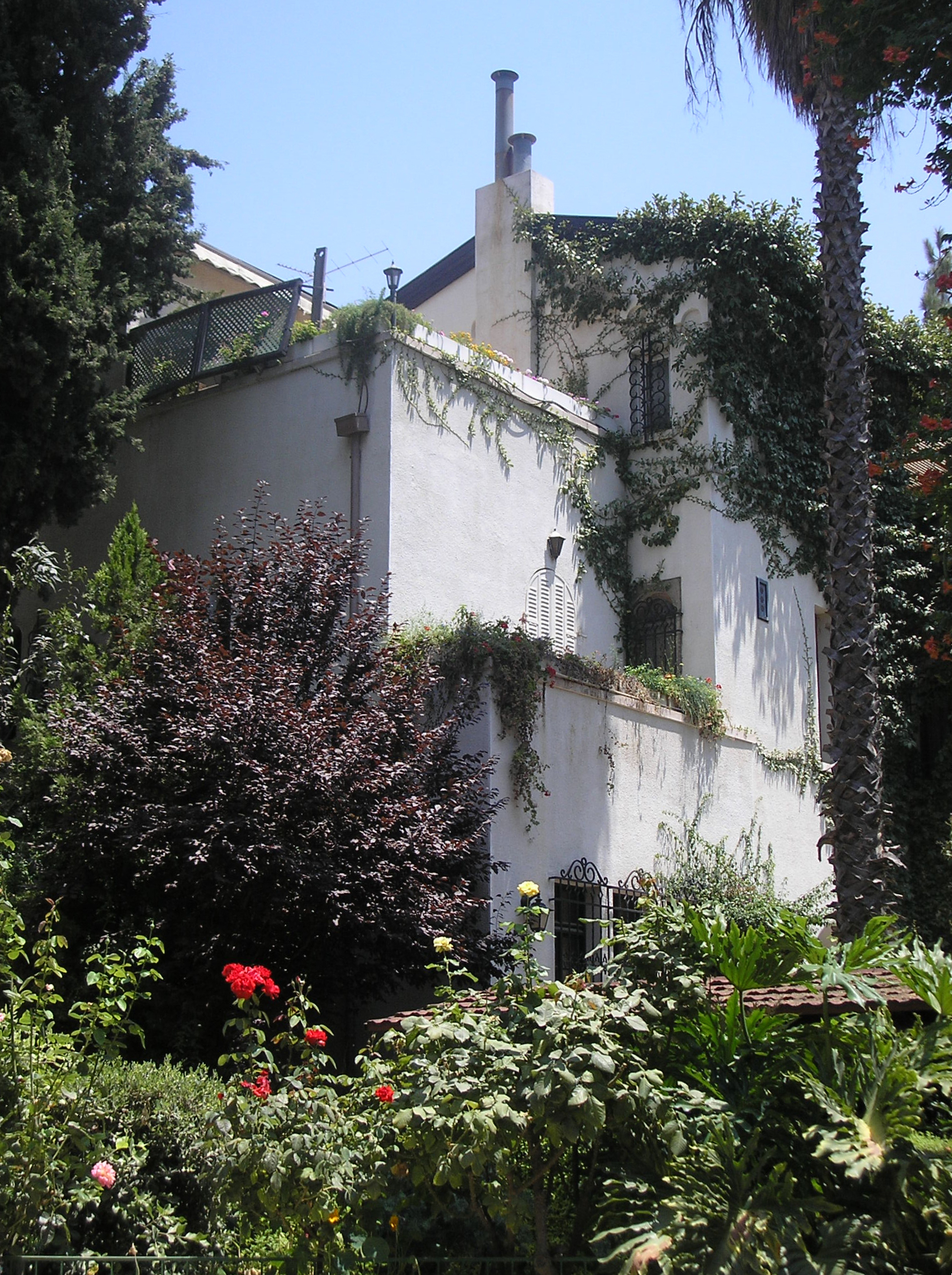 Beit Dov Yosef, Rehavia, Jerusalem